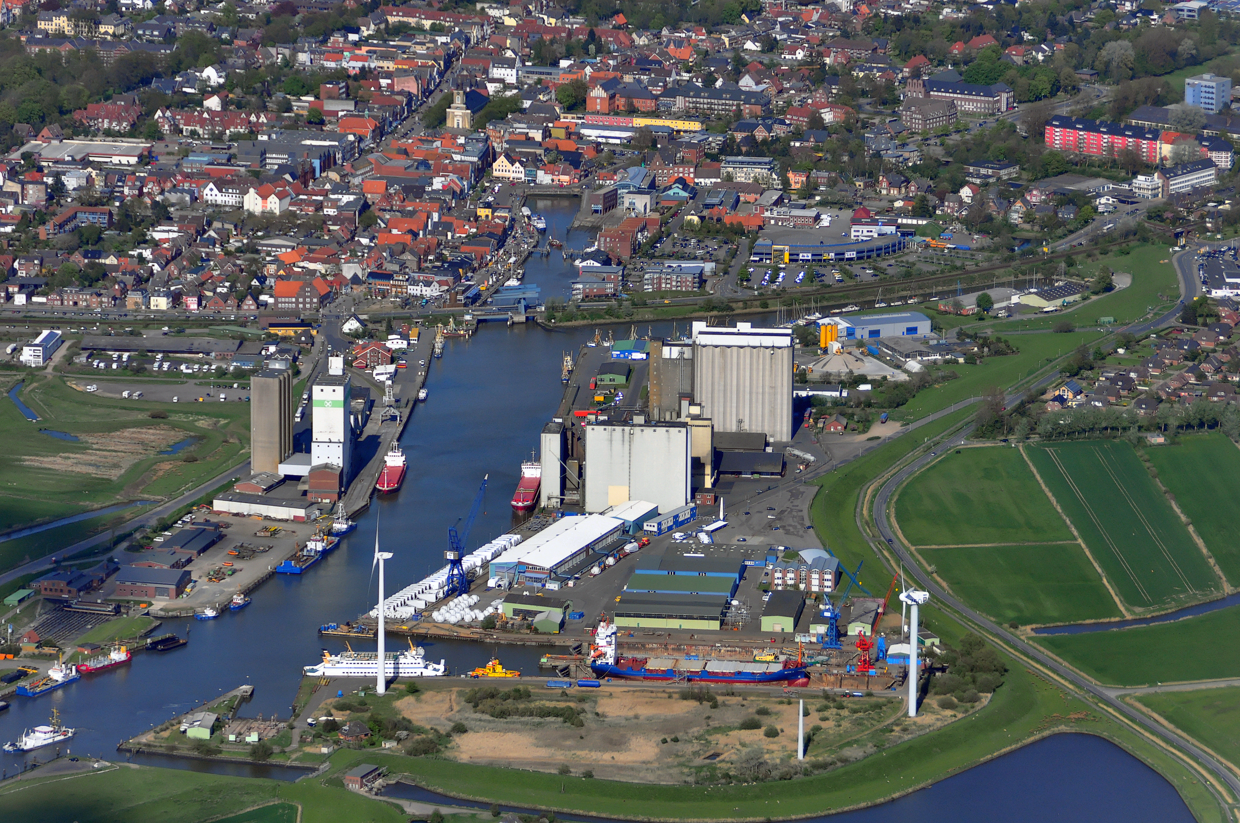 Luftbilder von der Nordseeküste 2012-05